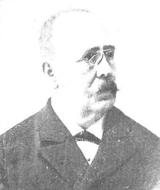 Retrato de José Canalejas y Casas.